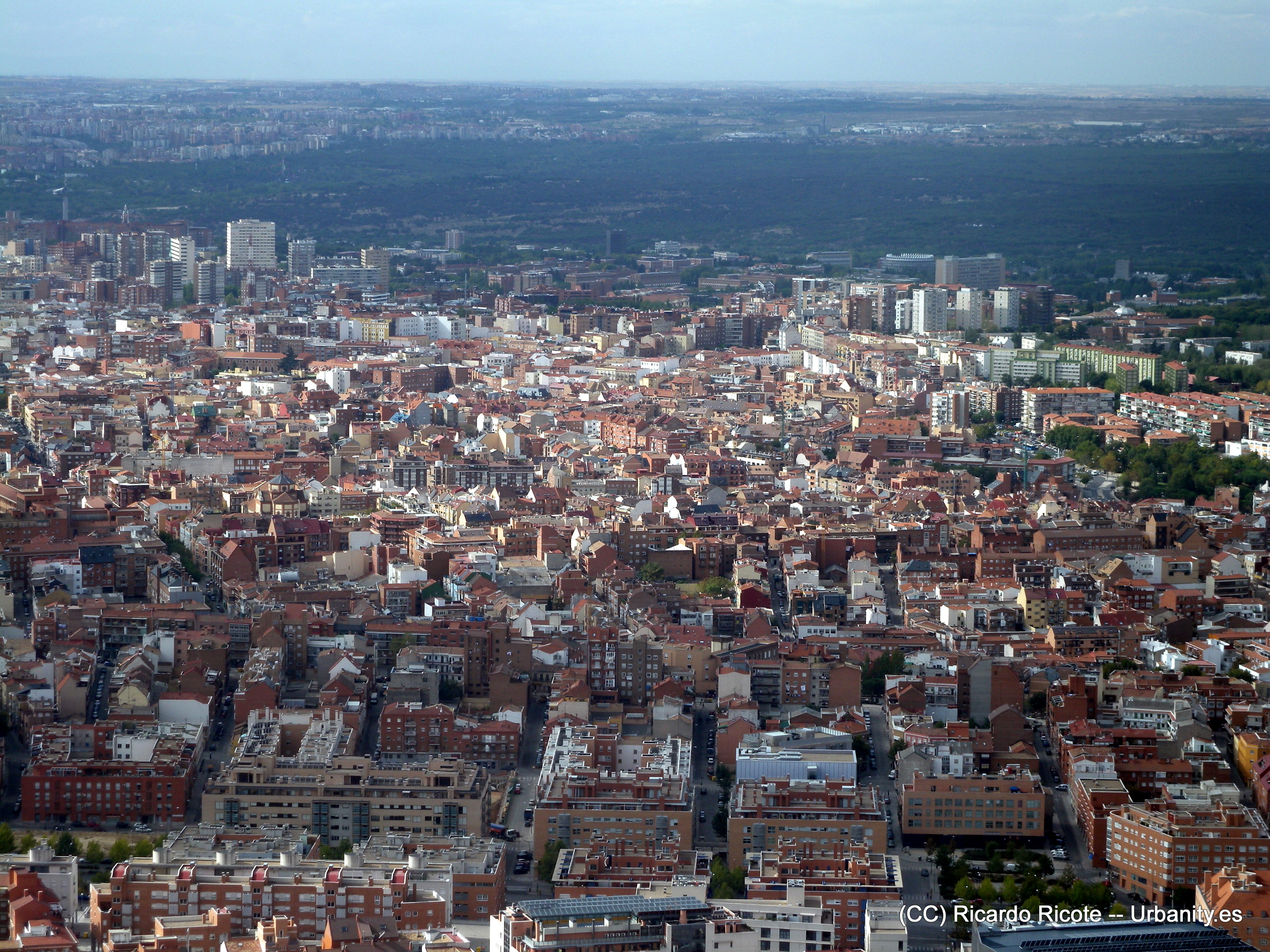 Valdeacederas desde Torre Sacyr